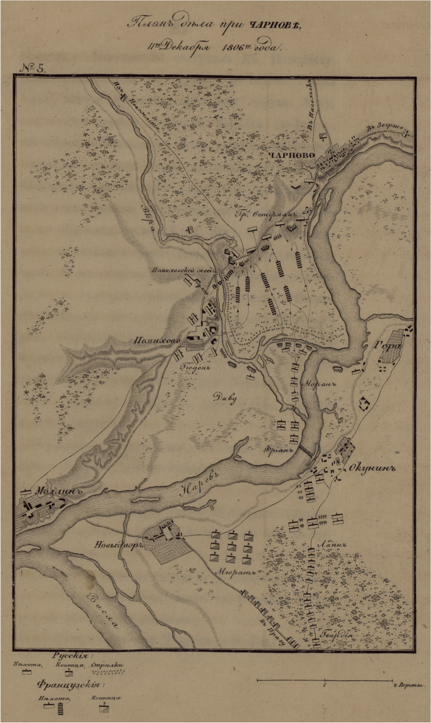 План дела при Чарнове 11 Декабря 1806 года